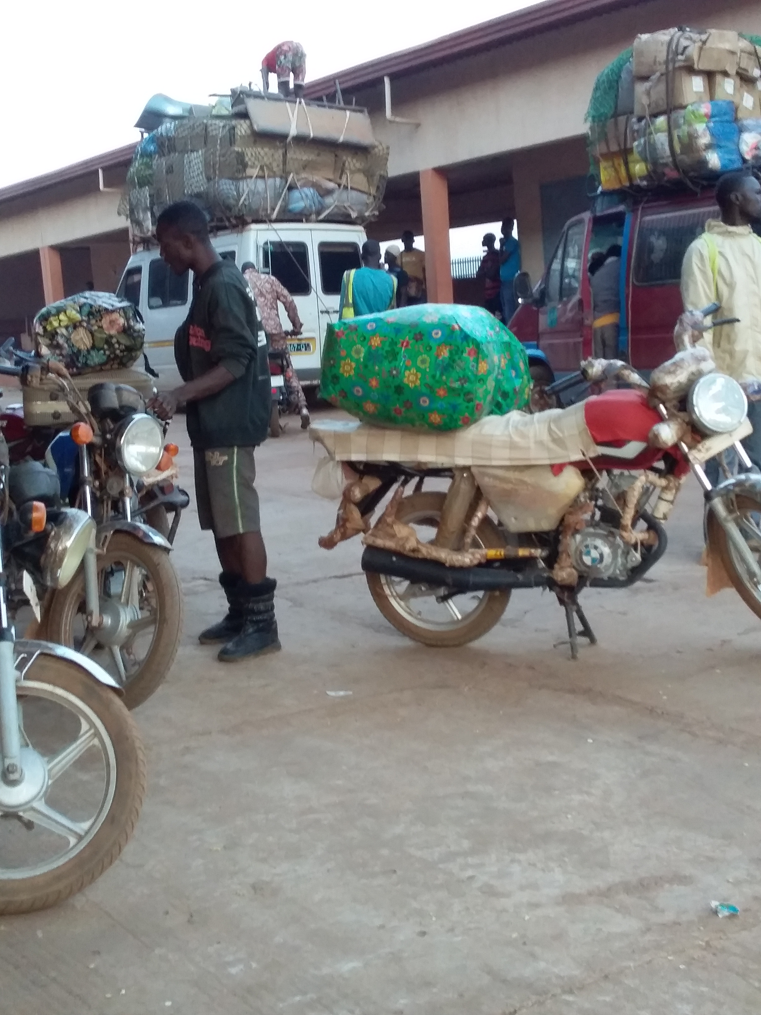 Gare de kankan This is an image with the theme "Africa on the Move or Transport" from: Guinea